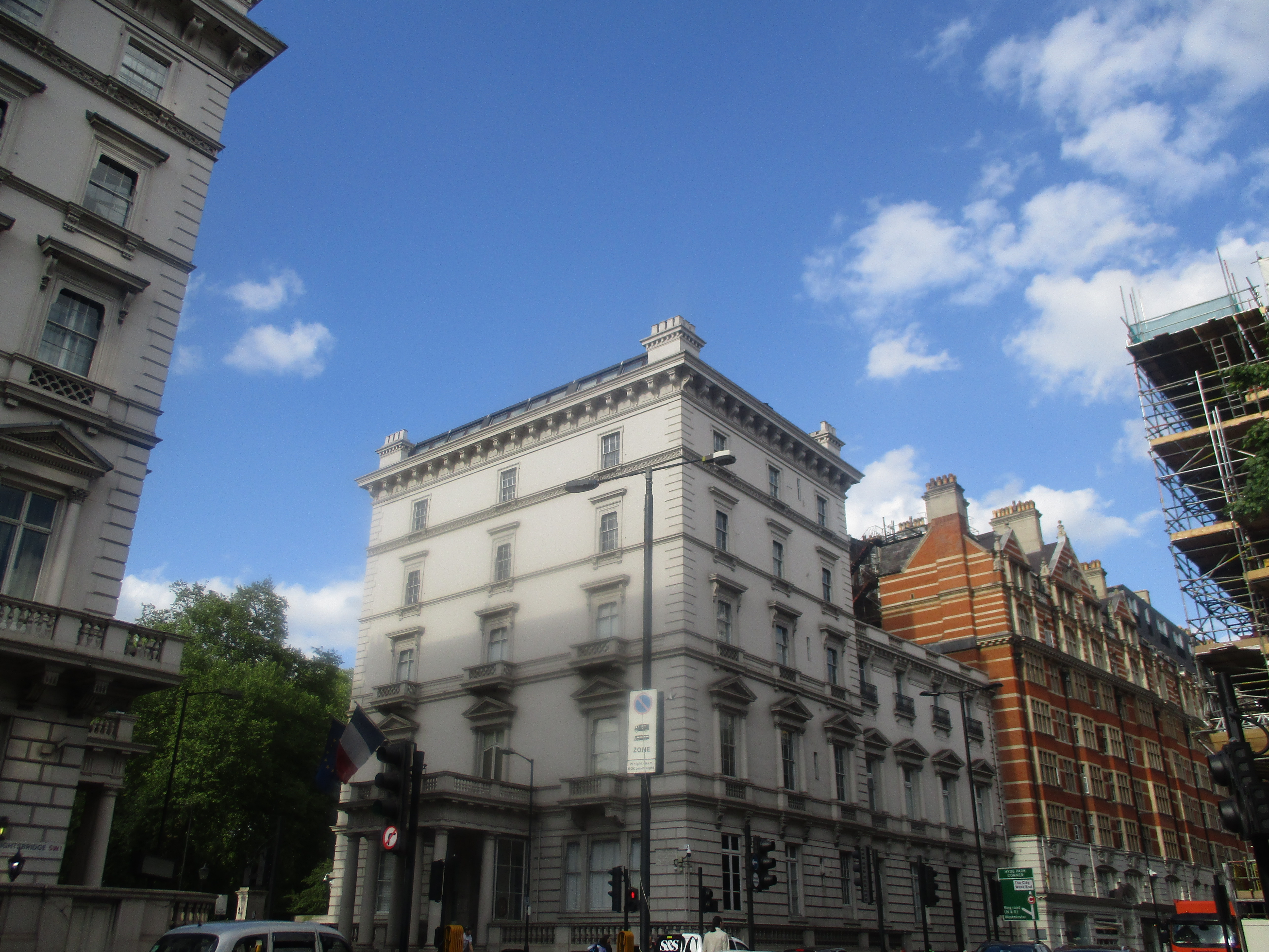 Ambassade de France à Londres.